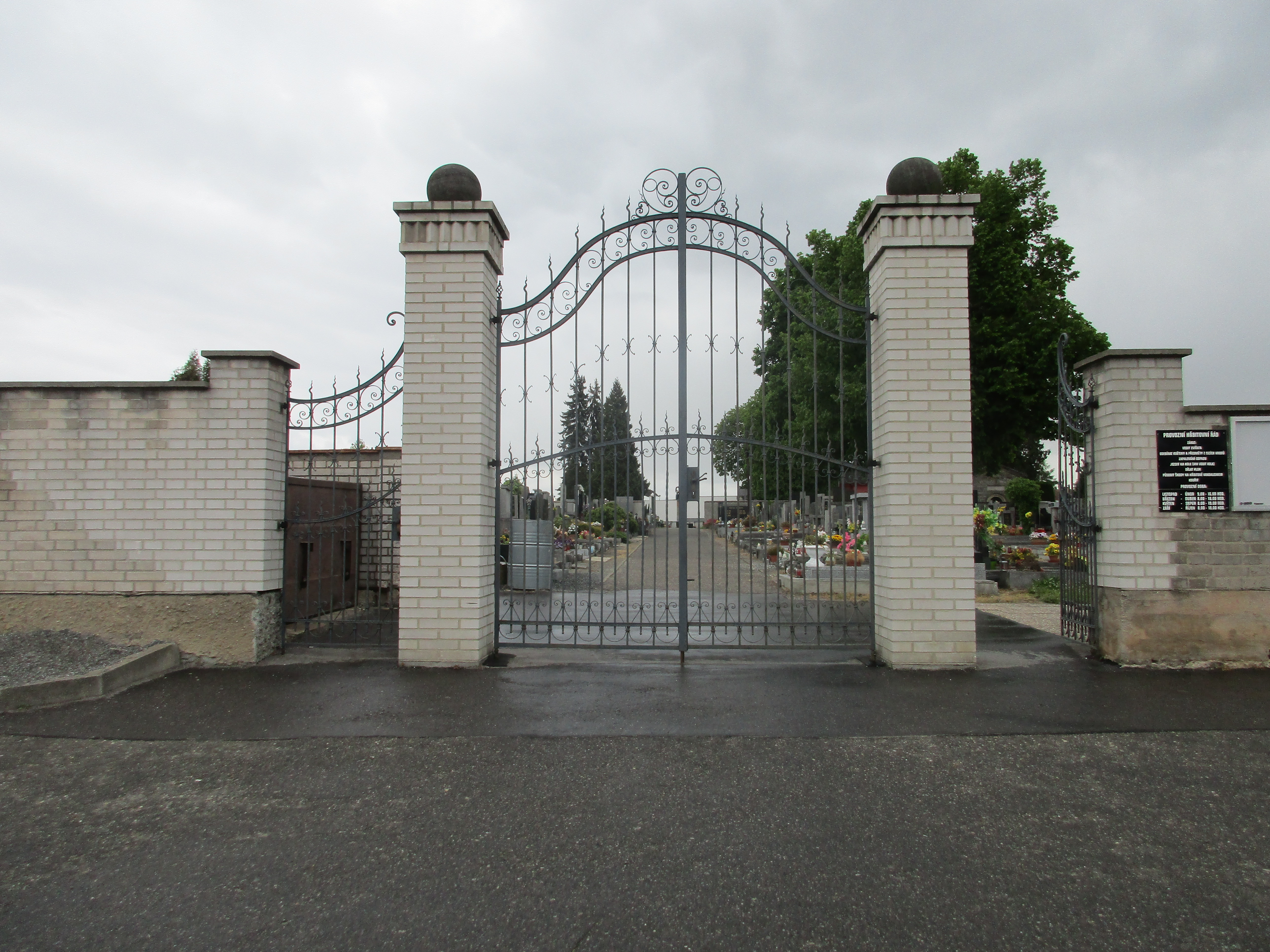 Hřbitov Chvaly.